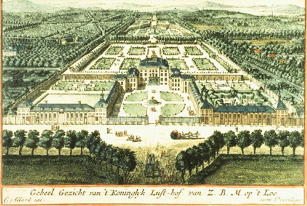 engraving of Het Loo, Netherlands